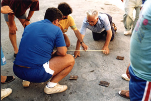 Han caigut monedes